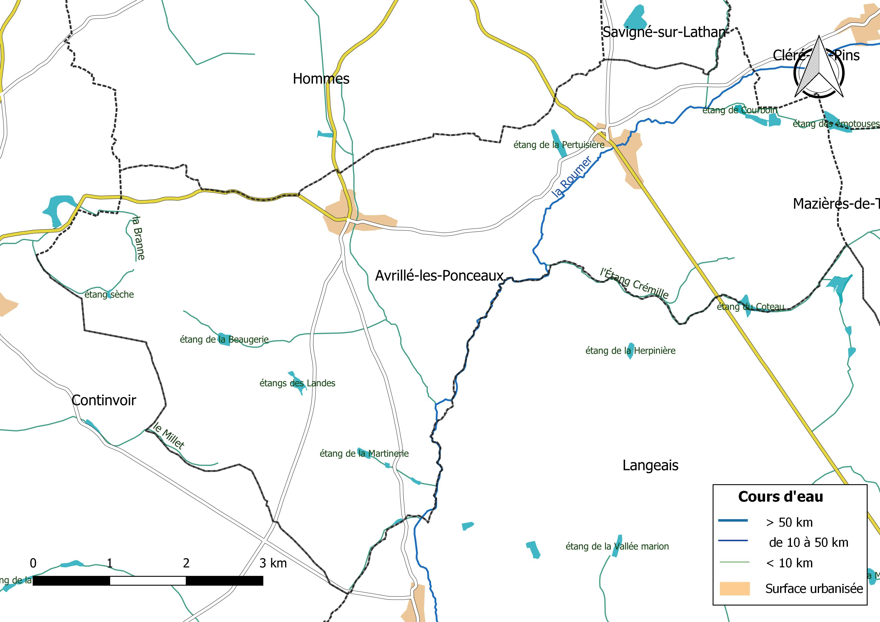 Carte du réseau hydrographique de la commune de Avrillé-les-Ponceaux (France).